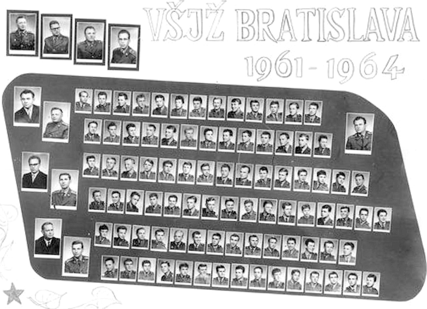 Digitalizovaný obrázok z roku 1964. Maturitný ročník absolventov Vojenskej školy Jana Žižku z Trocnova, ktorí na tejto škole študovali v rokoch 1961 až 1964.